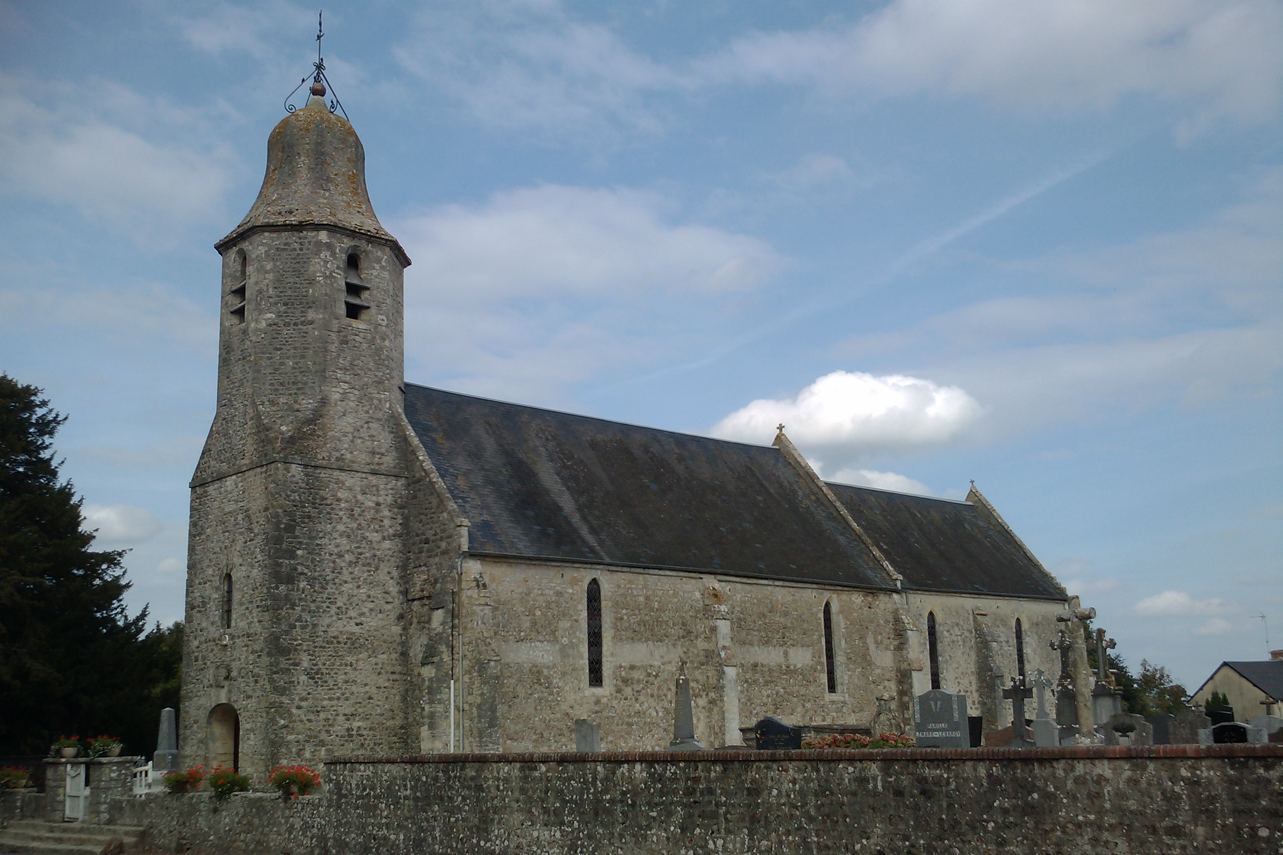 église Saint-Pellerin